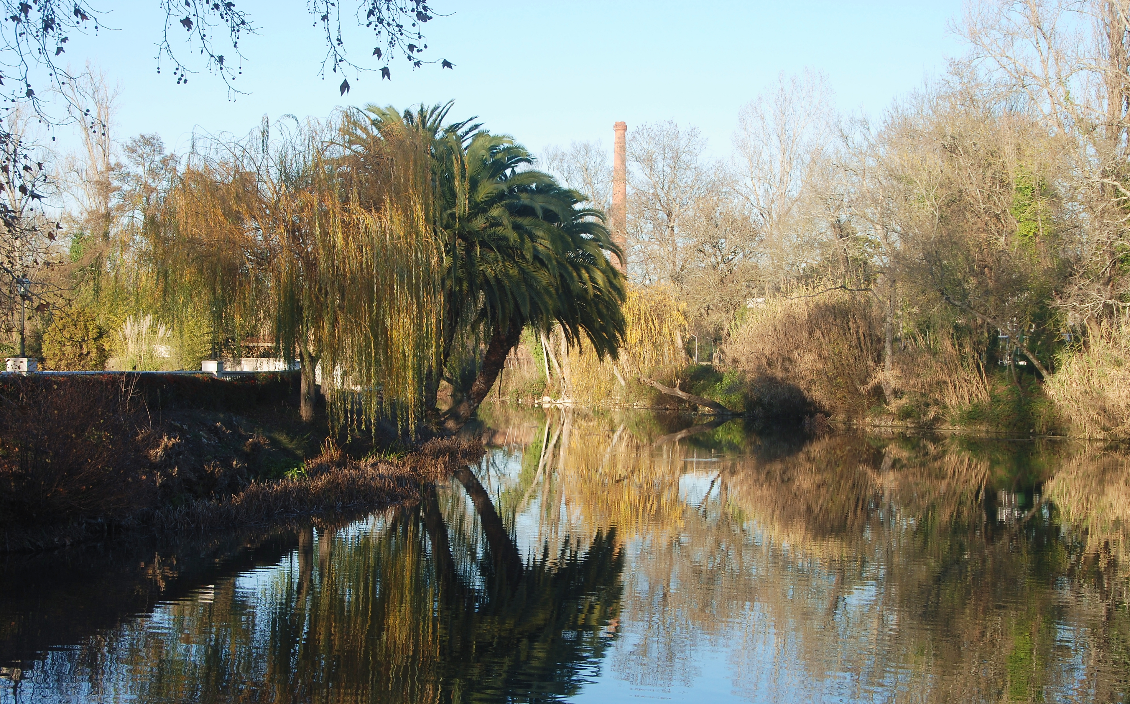 River Nabão, Tomar, Portugal